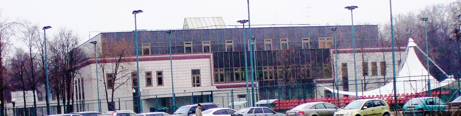 Спорткомплекс Лужники. Мультиспорт